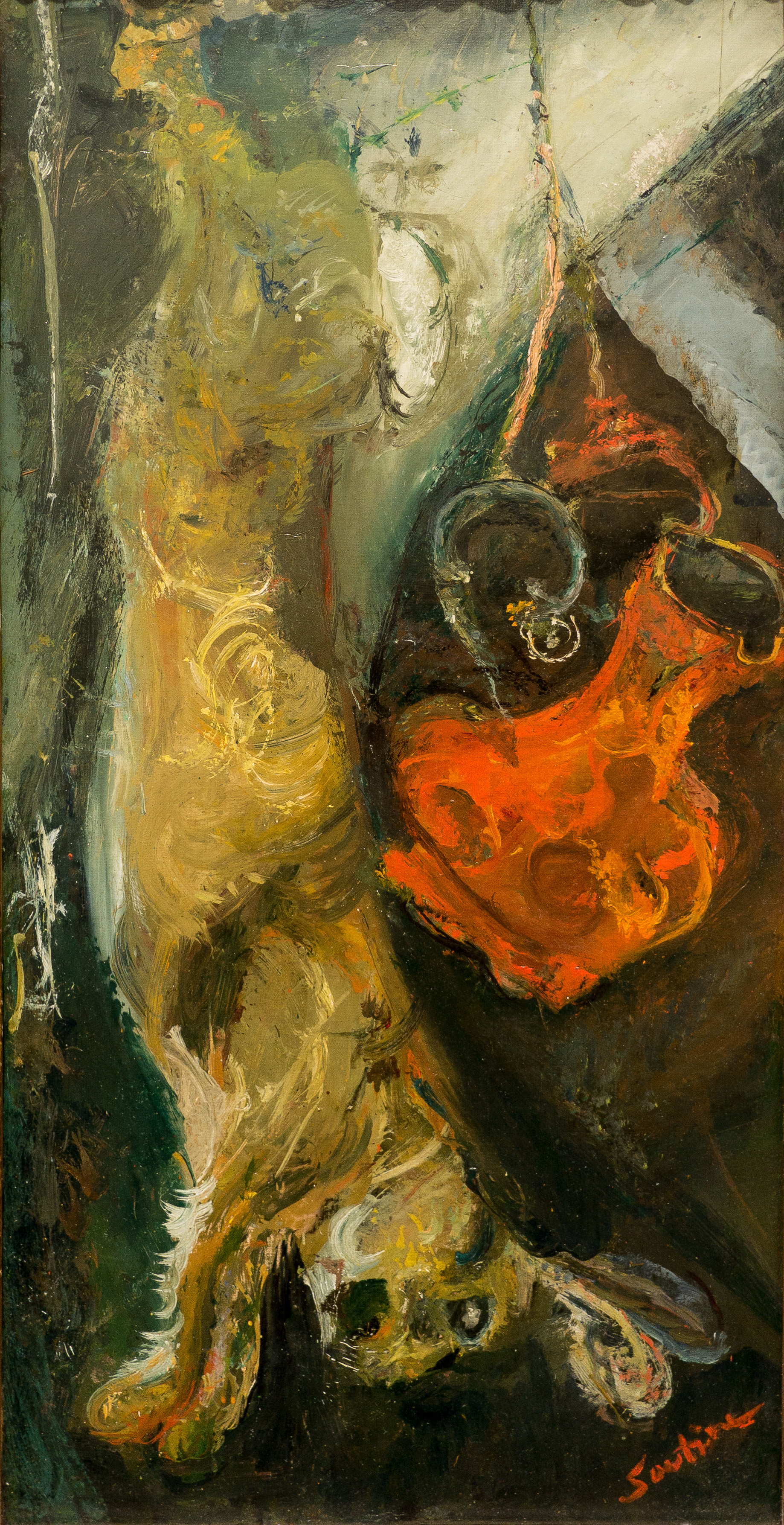 Chaïm Soutine (1893 - 1943), "Le lapin", huile sur toile, vers 1923-1924, Coll. Jean Walter et Paul Guillaume, Musée de l'Orangerie, Paris